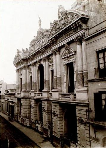 Fachada del segundo edificio del Teatro Ópera de Buenos Aires, remodelado en 1889. Se encontraba en la calle Corrientes, entre Esmeralda y Suipacha, en el mismo lote que ocupa hoy el teatro homónimo inaugurado en 1936.